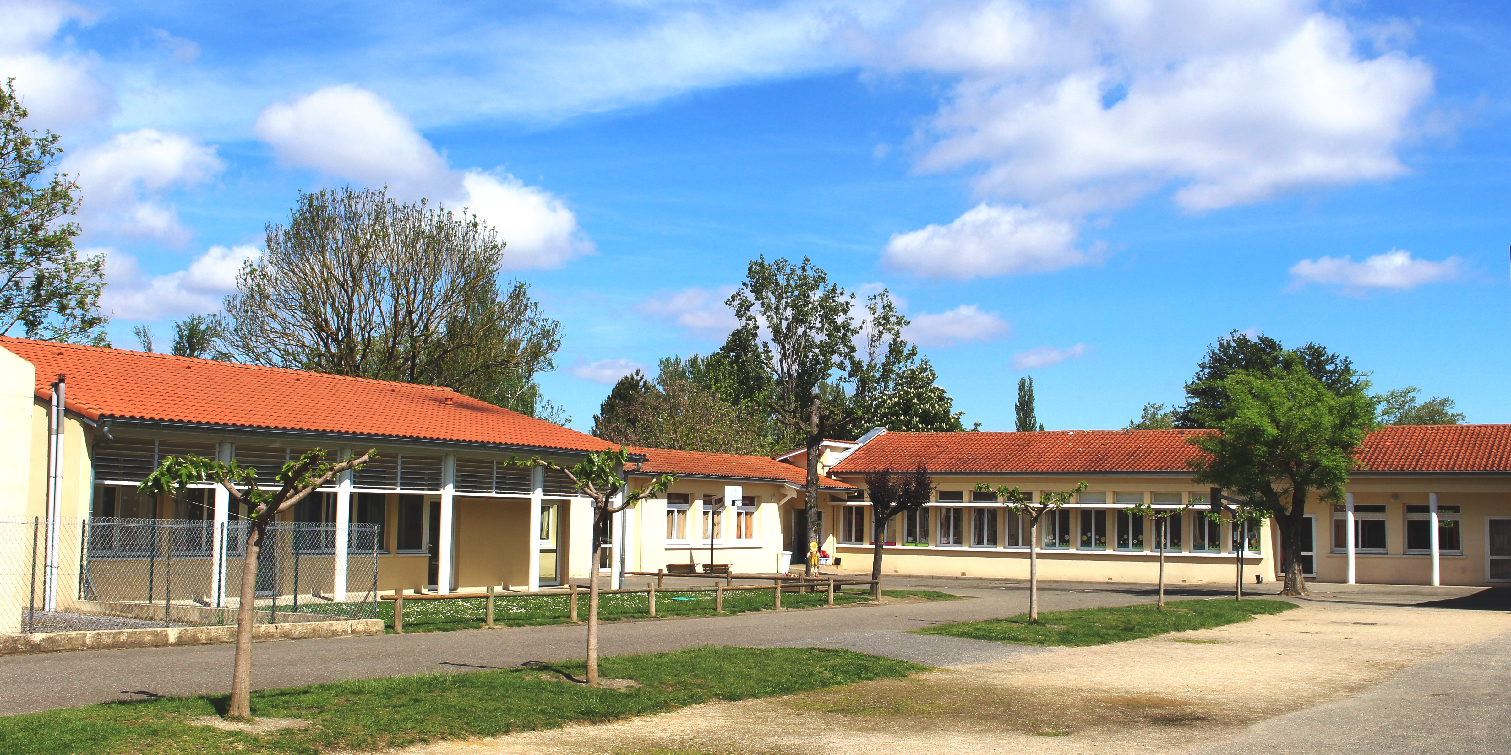 École de Bernac-Debat (Hautes-Pyrénées)